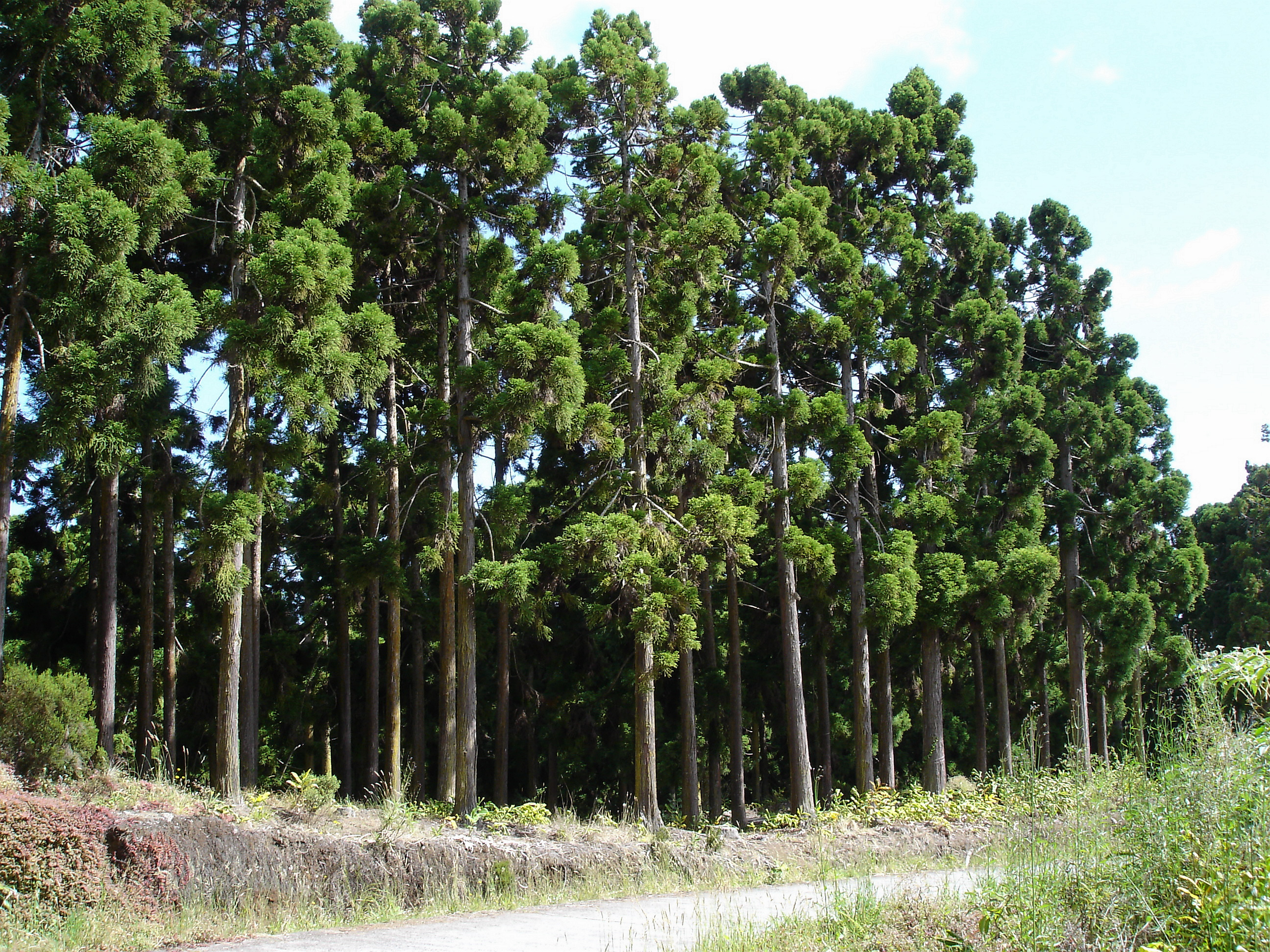 Description: Forêt de cryptomerias dans les Hauts de Saint-Gilles, novembre 2004, La Réunion Source:Bouba